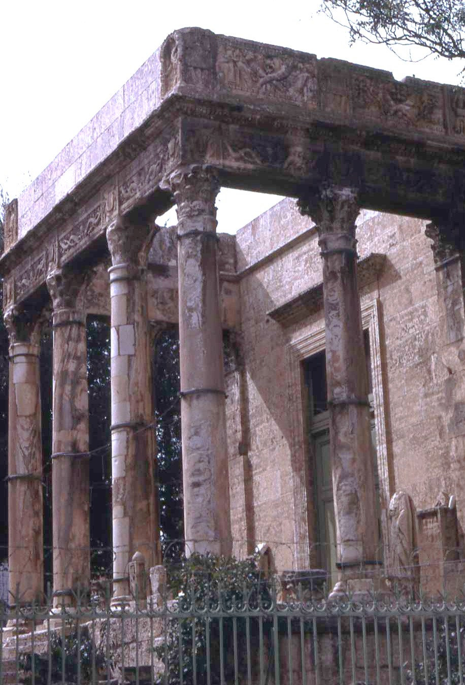 Ruines romaine de Tébessa, Algérie.